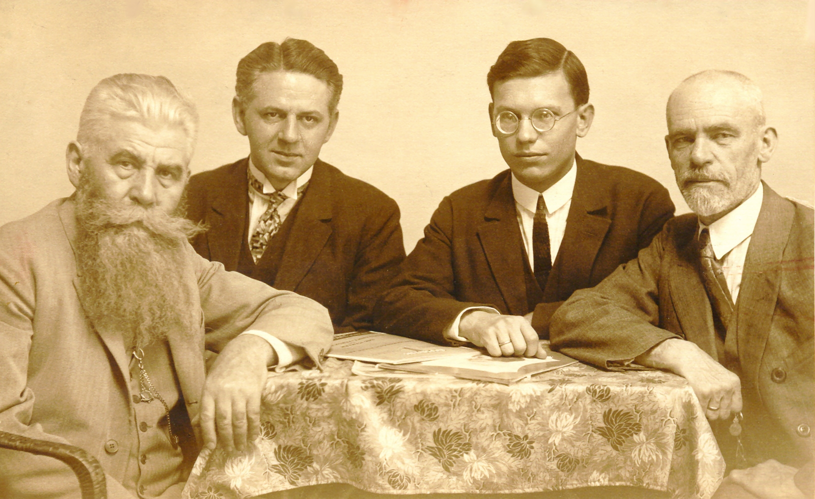 Von links nach rechts: Hanns Hörbiger, Hans Robert Hörbiger, Engelbert Pigal, Edgar von Wahl.